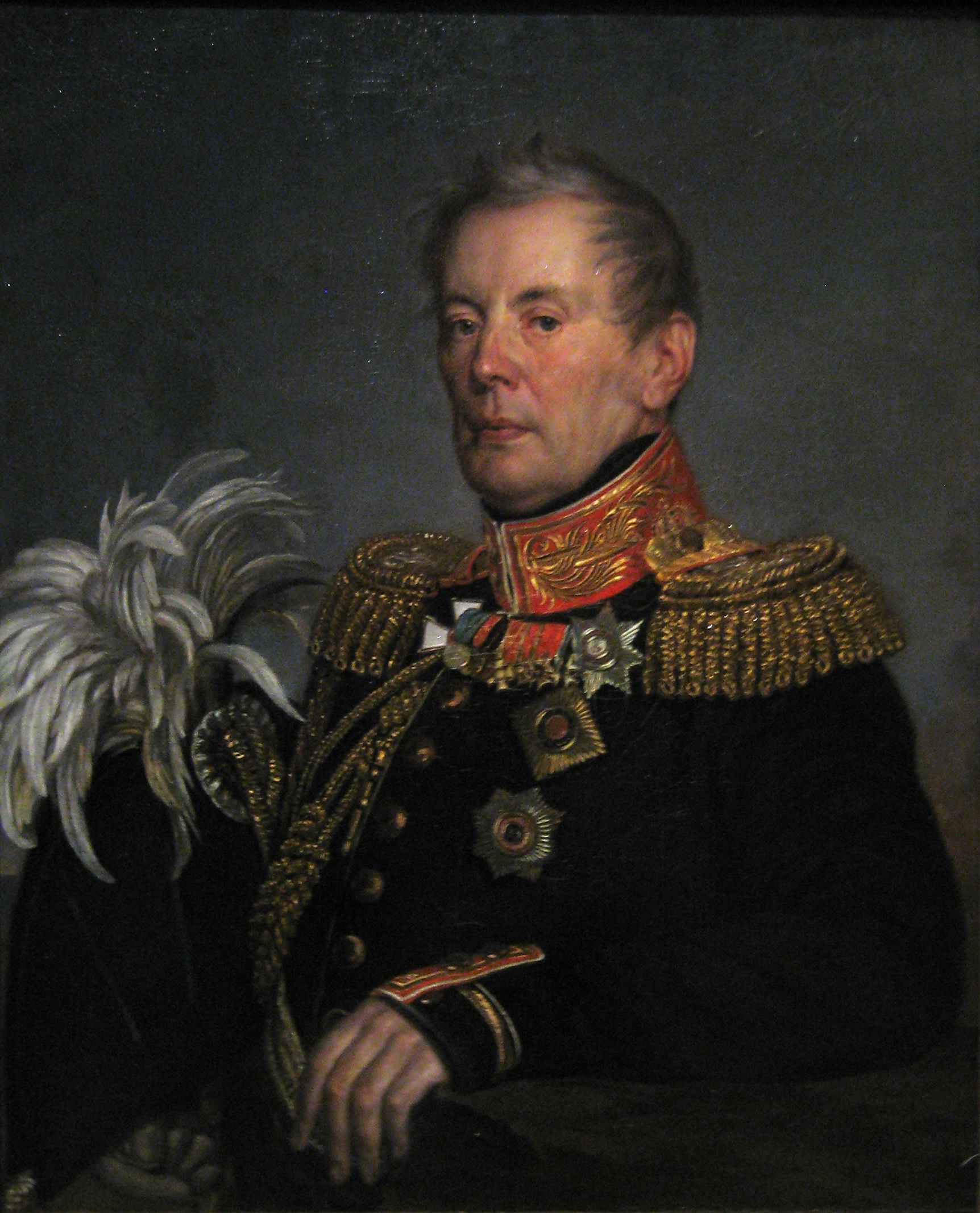 Выставка "Национальная портретная галерея", ГИМ, 2012